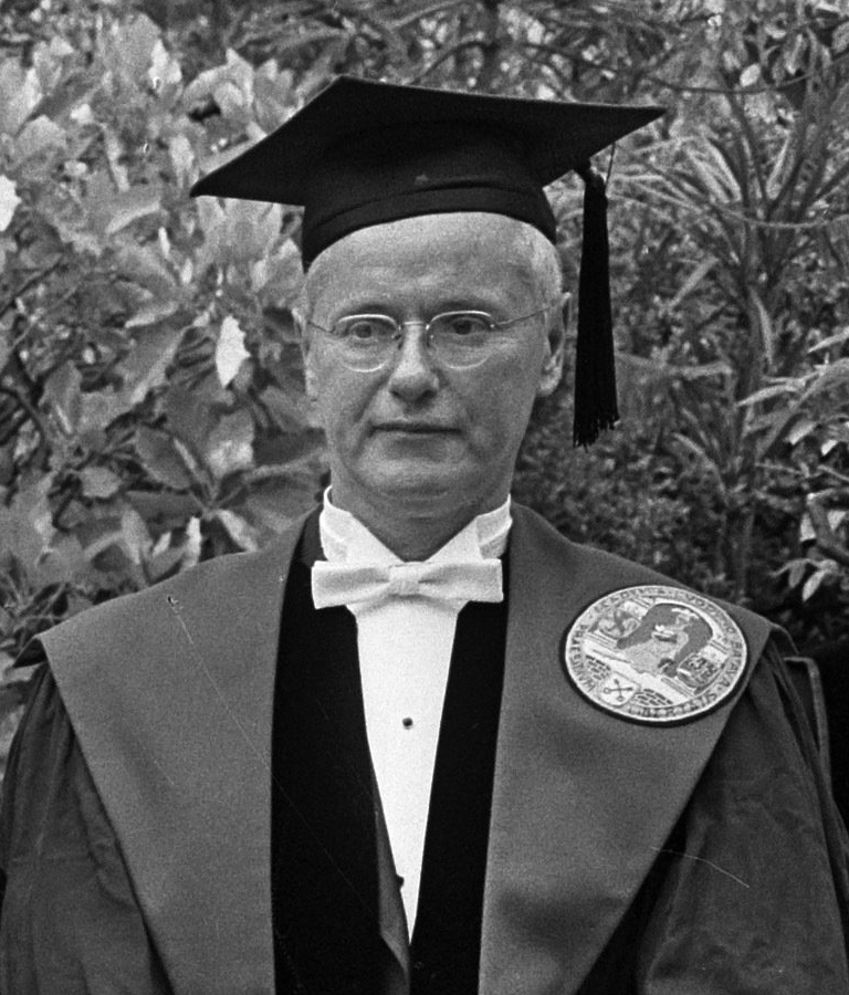 Eredoctoraten bij Leidse Universiteit uitgereikt, v.l.n.r. prof. dr. J. Waller , prof. dr. A. Giroud , de heer H. R. van Heekeren , prof. dr. R. K. Merton 2 juli 1965